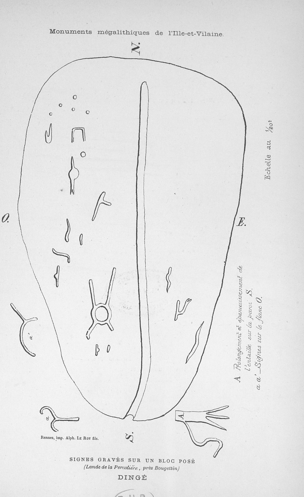 Relevé publié par P. Bézier en 1883 des sculptures figurant sur la Pierre de Bougettin.